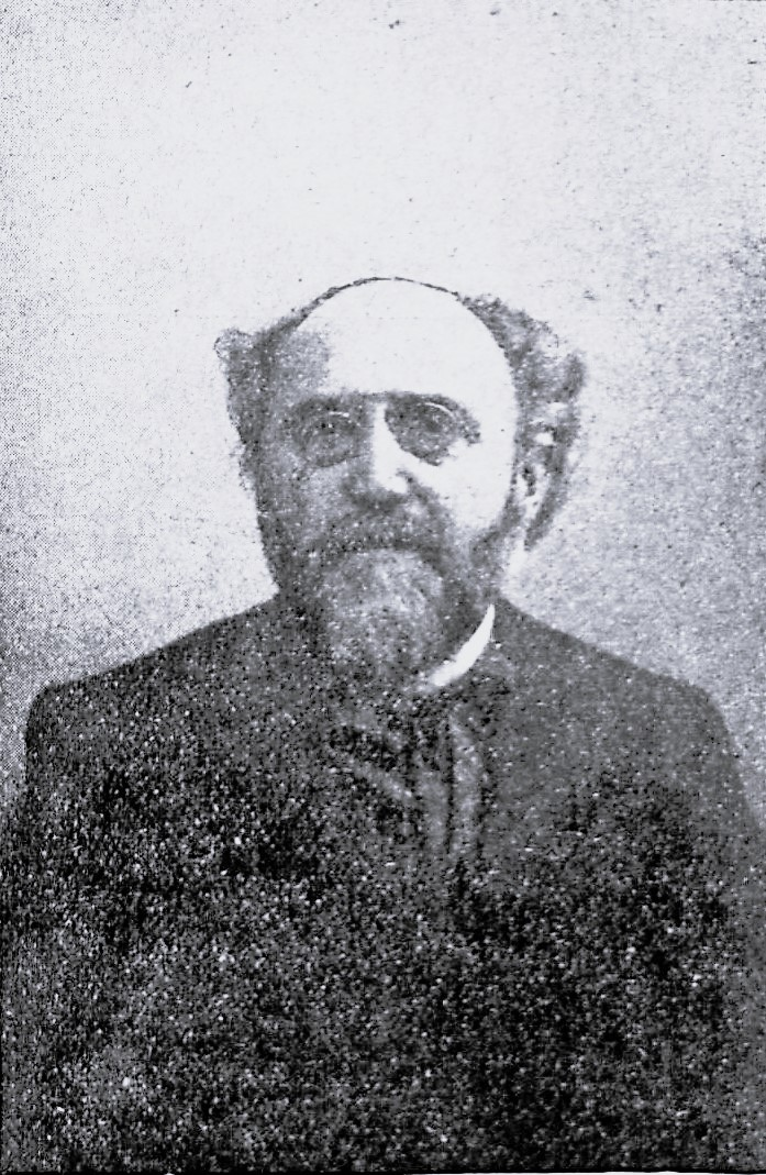 Professor Karl Hässler, Kapellmeister.